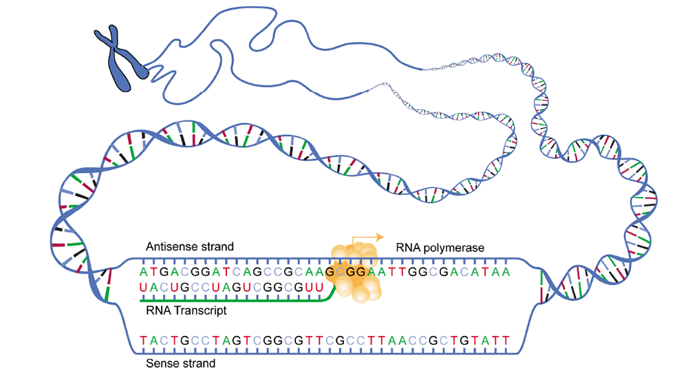 DNA, transcription